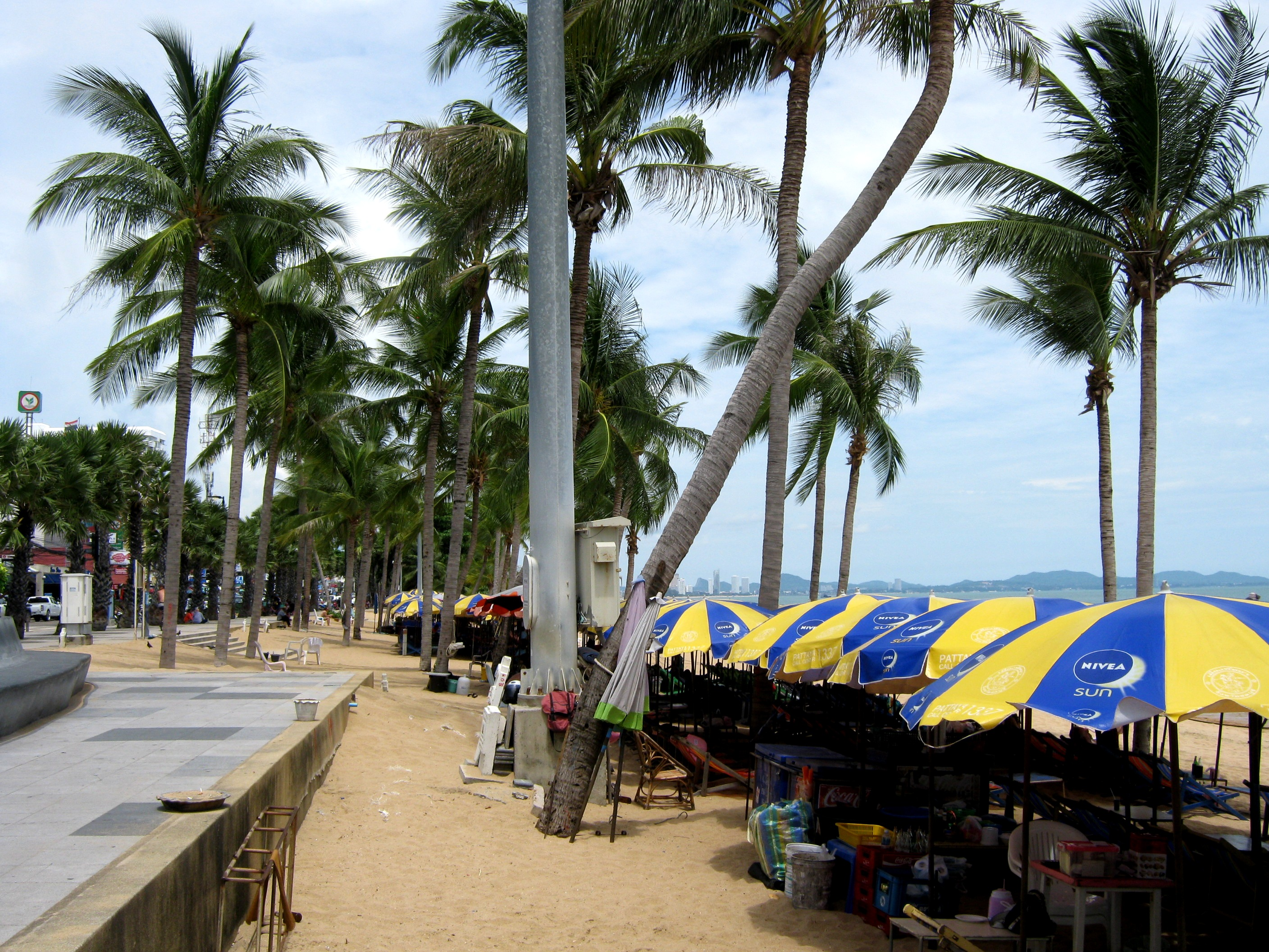 Jomtien Beach